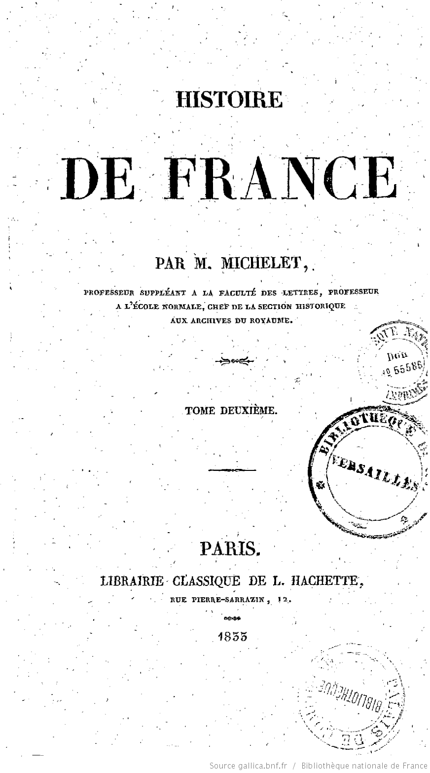 Première page du tome II de Histoire de France de Jules Michelet publié par Librairie classique de L. Hachette, Paris, 1833.